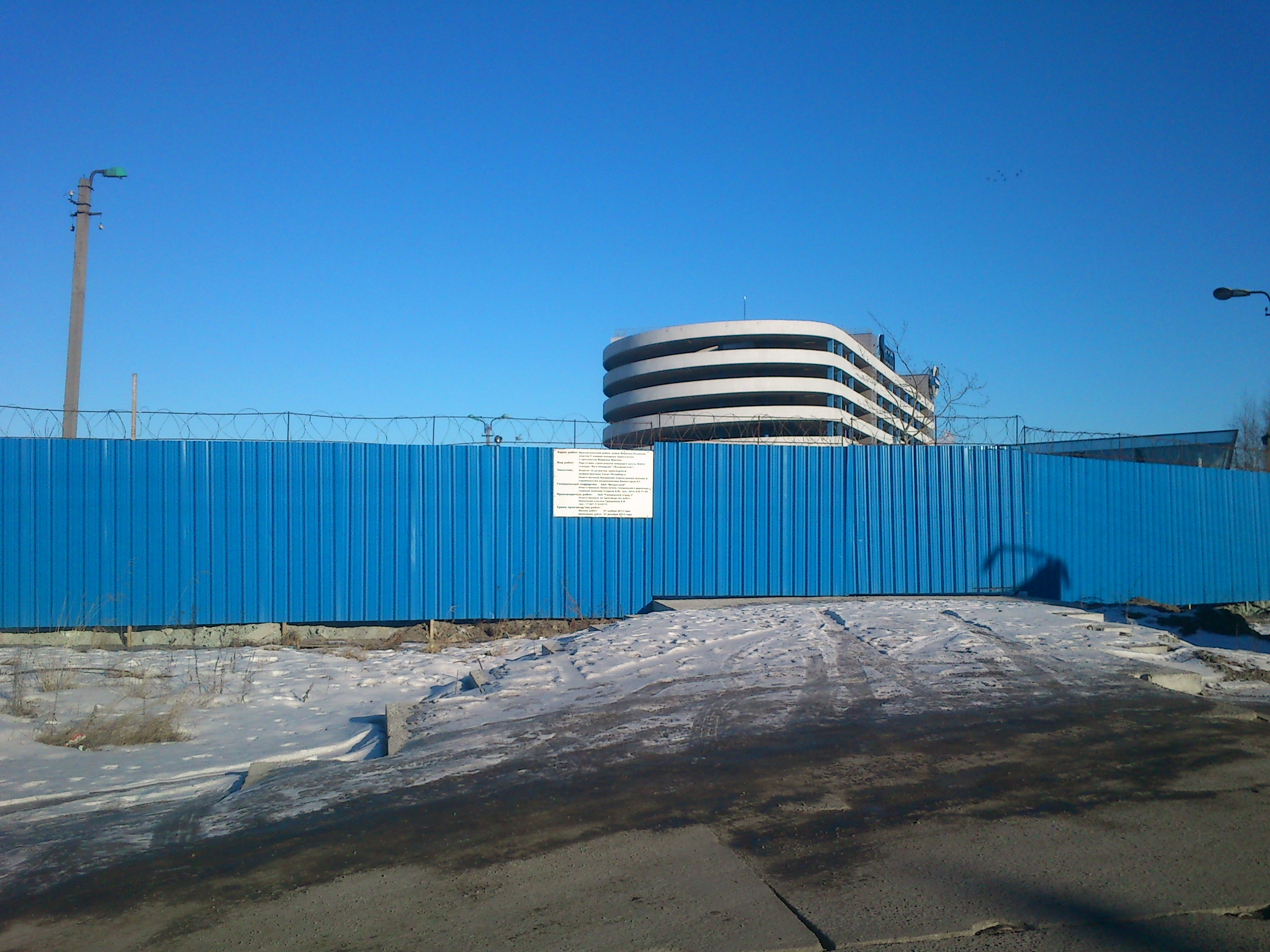 Строительная площадка станции Казаковская